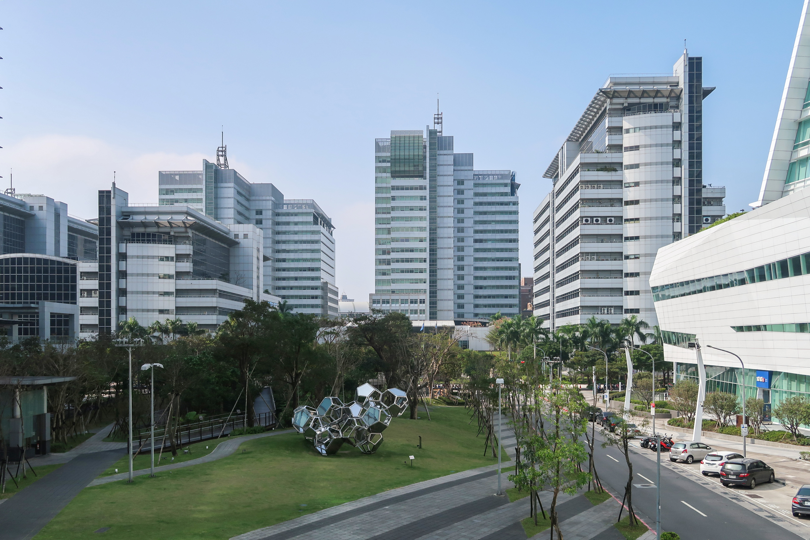 Nankang Software Park Phase 1